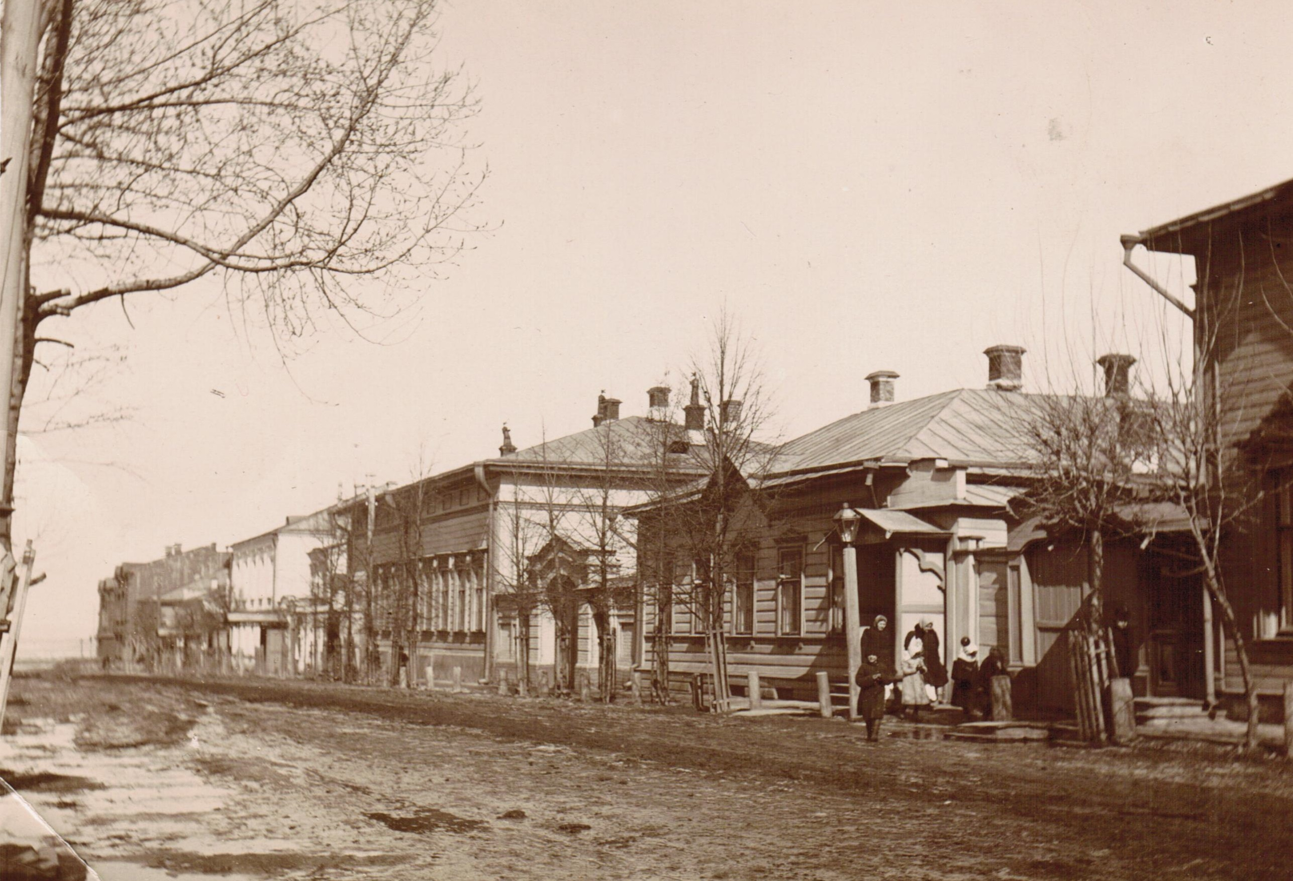 Улица Жуковского с домами, принадлежавшими профессору. Фотографии предоставлены правнуком из личного архива.